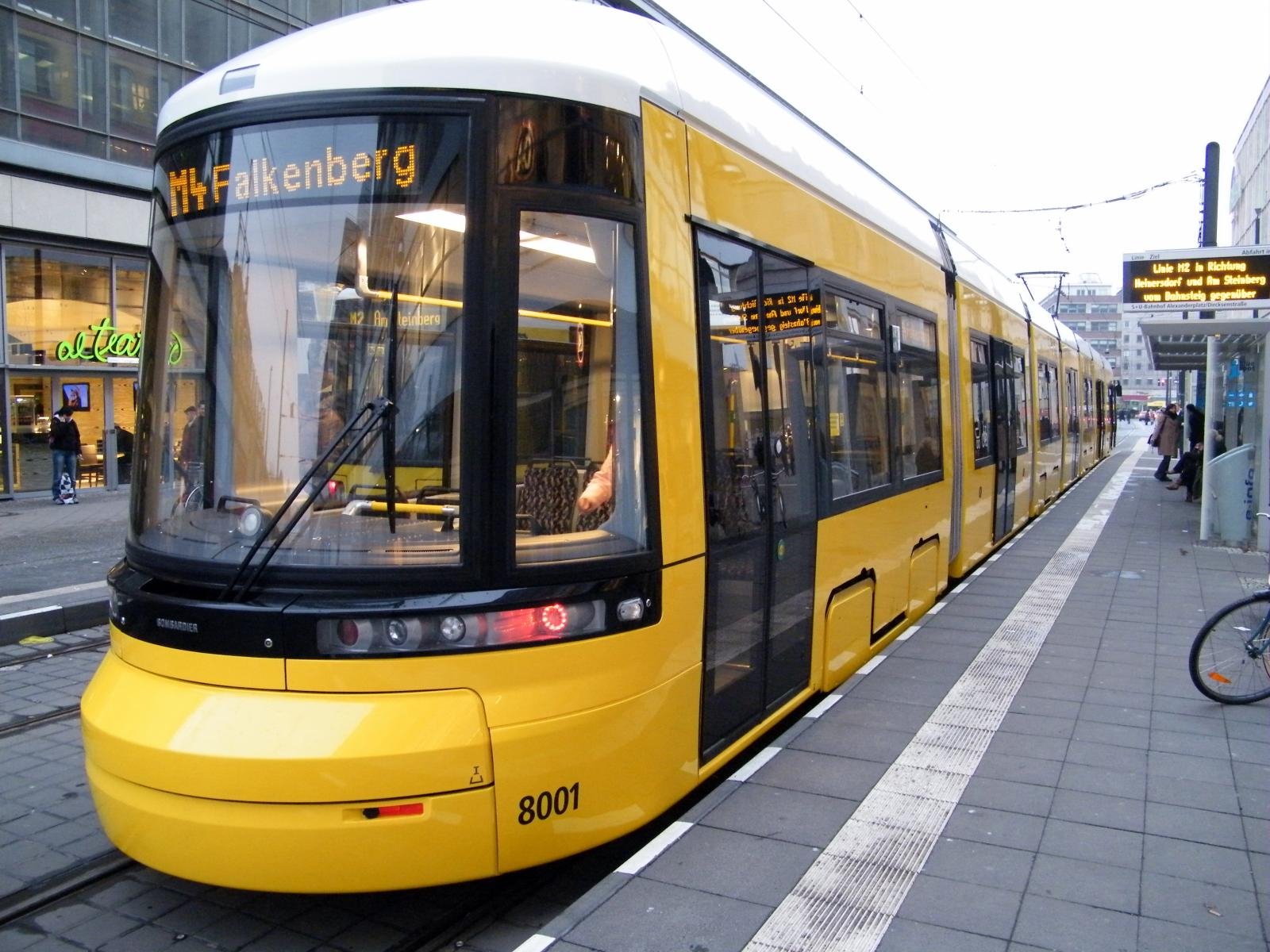 Vorserienfahrzeug im Betriebestest auf der Linie M4